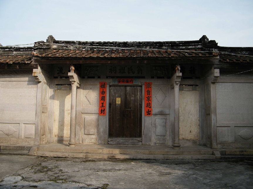 赤港翁氏祖祠 北德巷